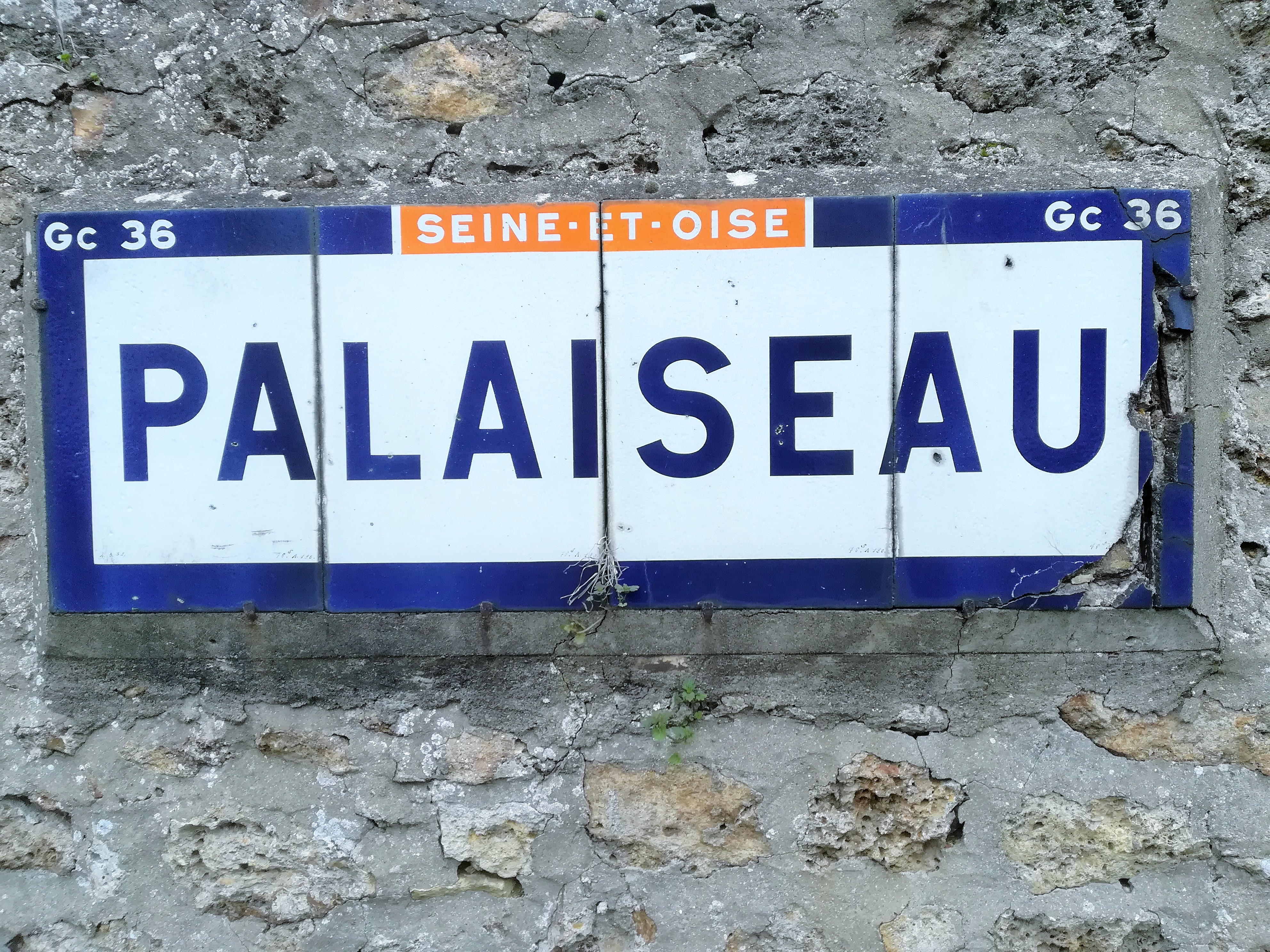 Panneau Palaiseau sur la ferme des granges sur le plateau de Palaiseau